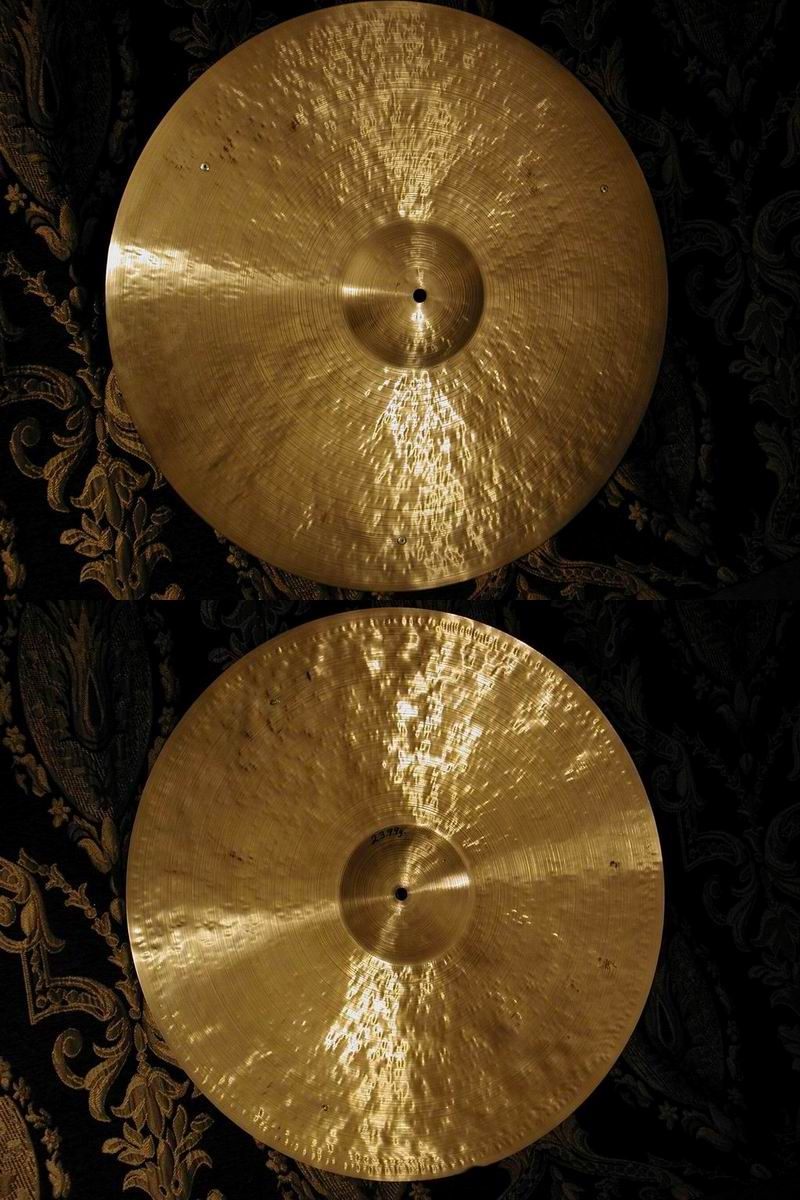 22" Spizzichino 2400g